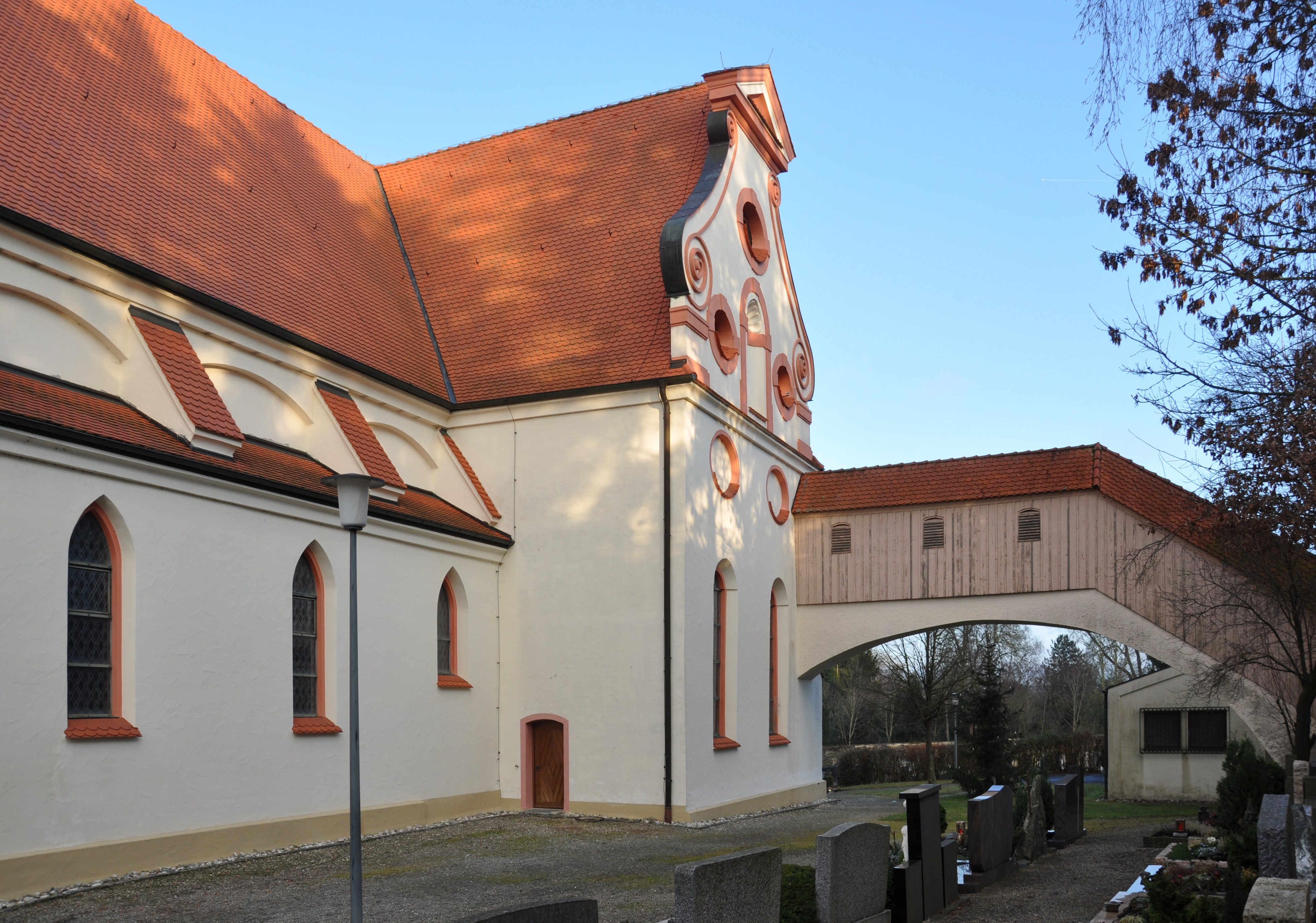 Oberstadion (Alb-Donau-Kreis), Pfarrkirche St. Martinus, Außenansicht von Süden mit überdachtem Aufgang zur (1962 entfernten) Dienerschaftsloge vom Schlosspark aus